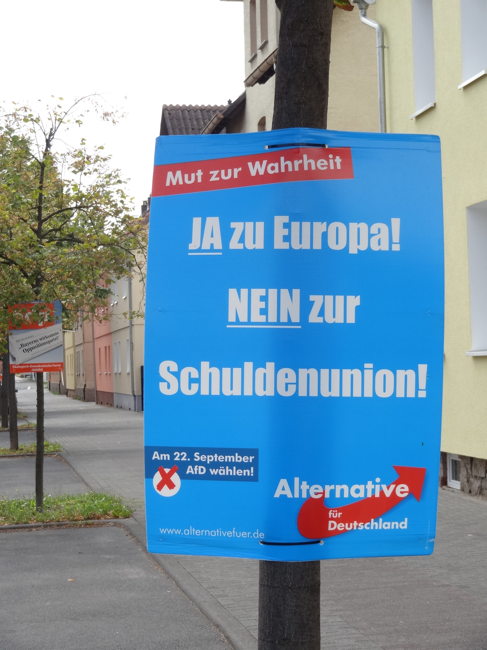 Wahlplakat 2013 (nur Text)